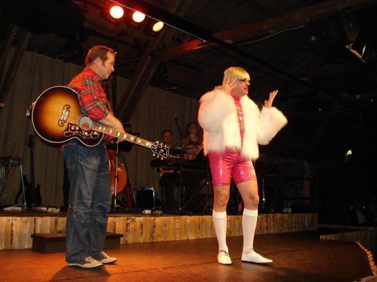 Bild tagen på krogshowen Cabaret Cartwright